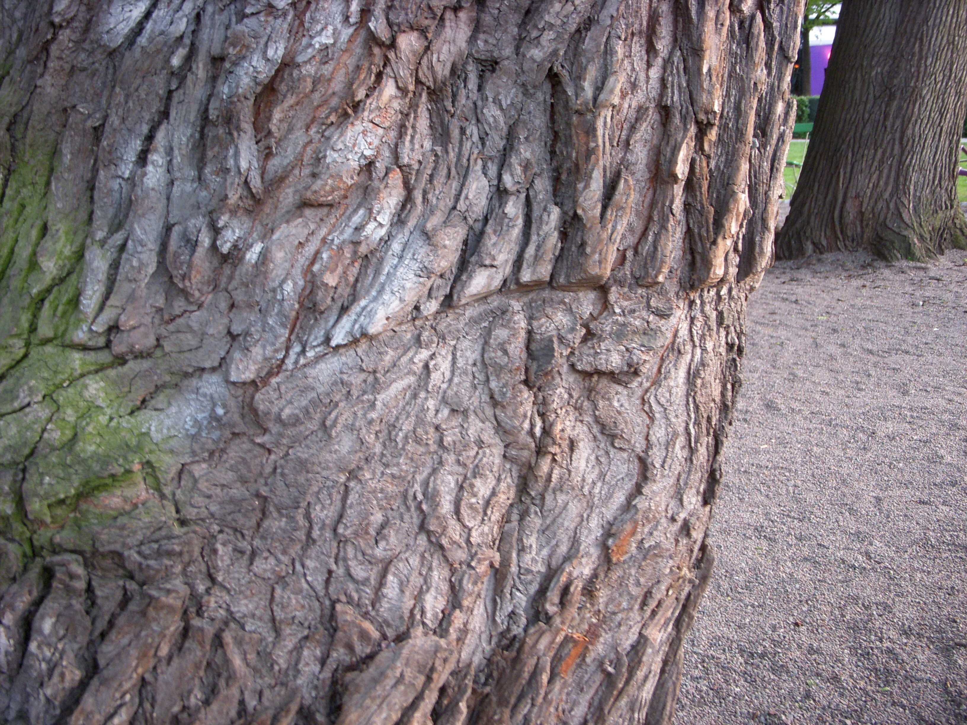 Almstriden i Kungsträdgården firas 40 år senare, 11 maj 2011, sågmärken i en av almarna.